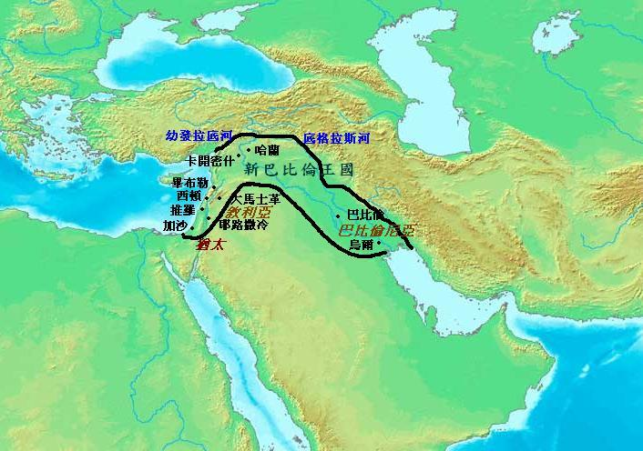 新巴比倫王國。